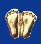 Insigne pro-vie représentant les pieds d'un enfant 10 semaines après sa conception